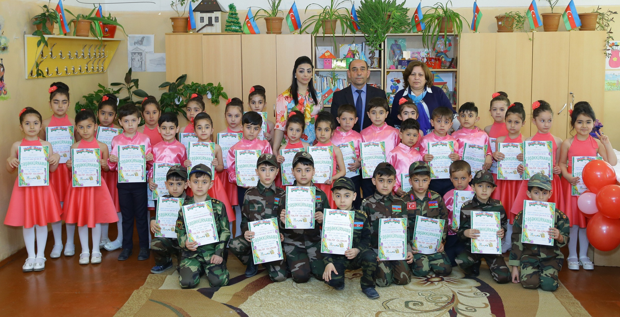 Sumqayıt şəhəri 4 nömrəli tam orta məktəbin 1d sinfində Əlifba bayramı. Müəllimə: Şəfəq Mehdiyeva. Metodist: Əlhəddin Paşayev